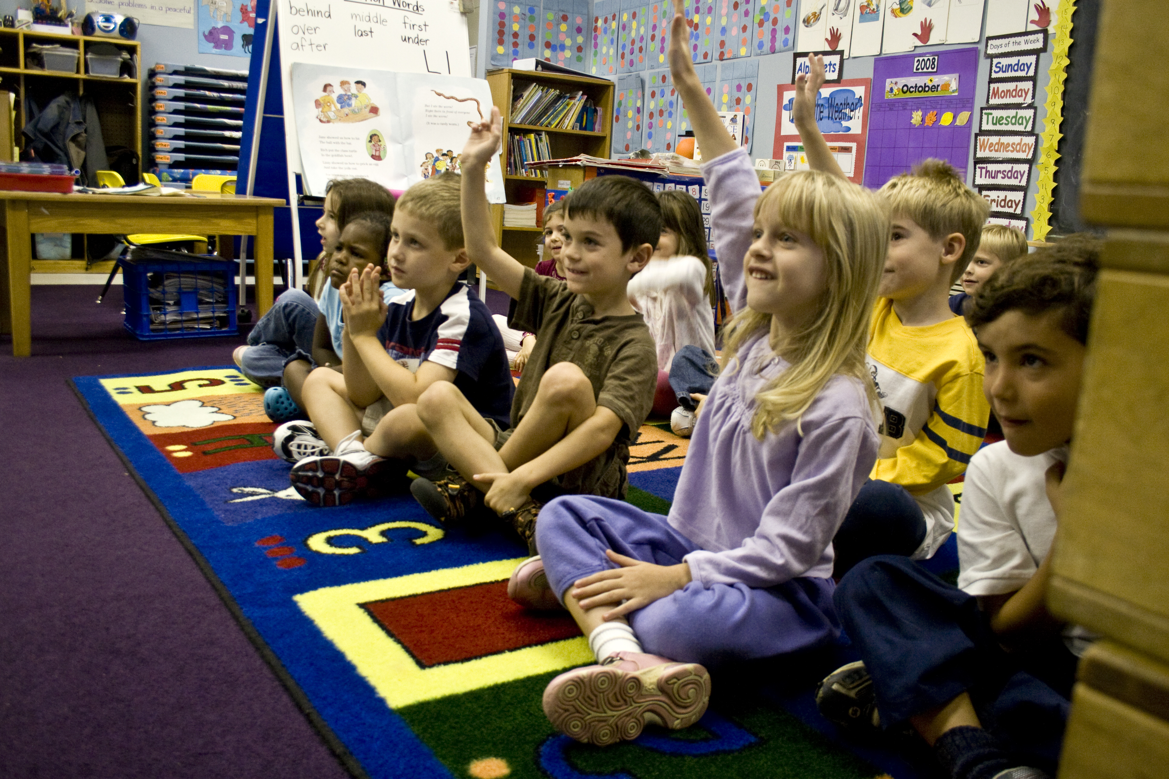 kindergarten is fun